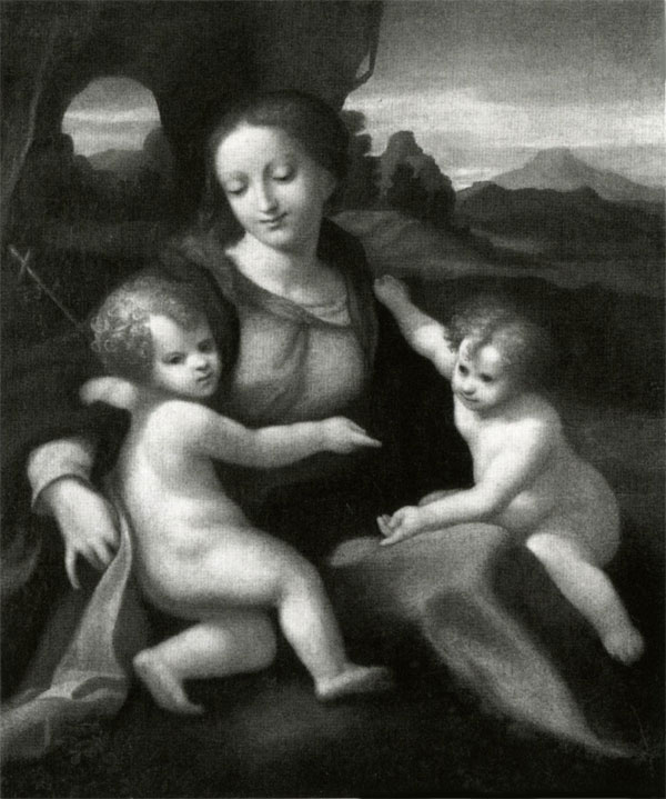 Correggio, madonna di casalmaggiore